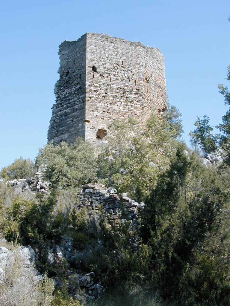 Torre de Escanilla